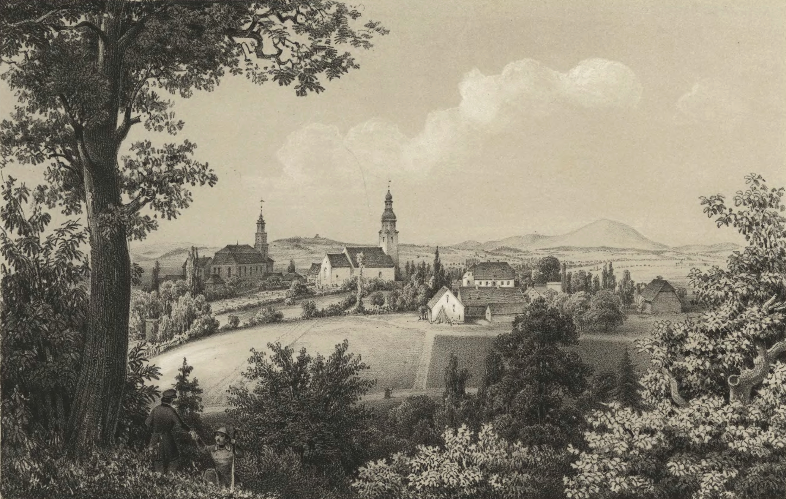 Blick auf Nieder-Salzbrunn in Niederschlesien im 19. Jahrhundert. Zeichnung von Ferdinand Koska, Lithografie von Wilhelm Loeillot (1827–1876).